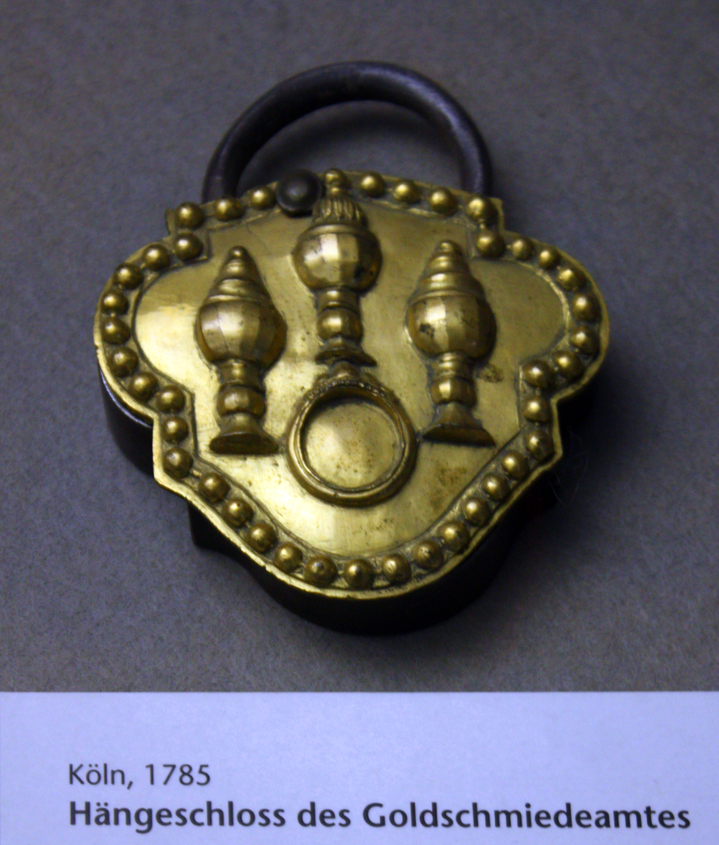 Kölner Goldschmiedeamt, Hängeschloss aus dem Jahr 1785